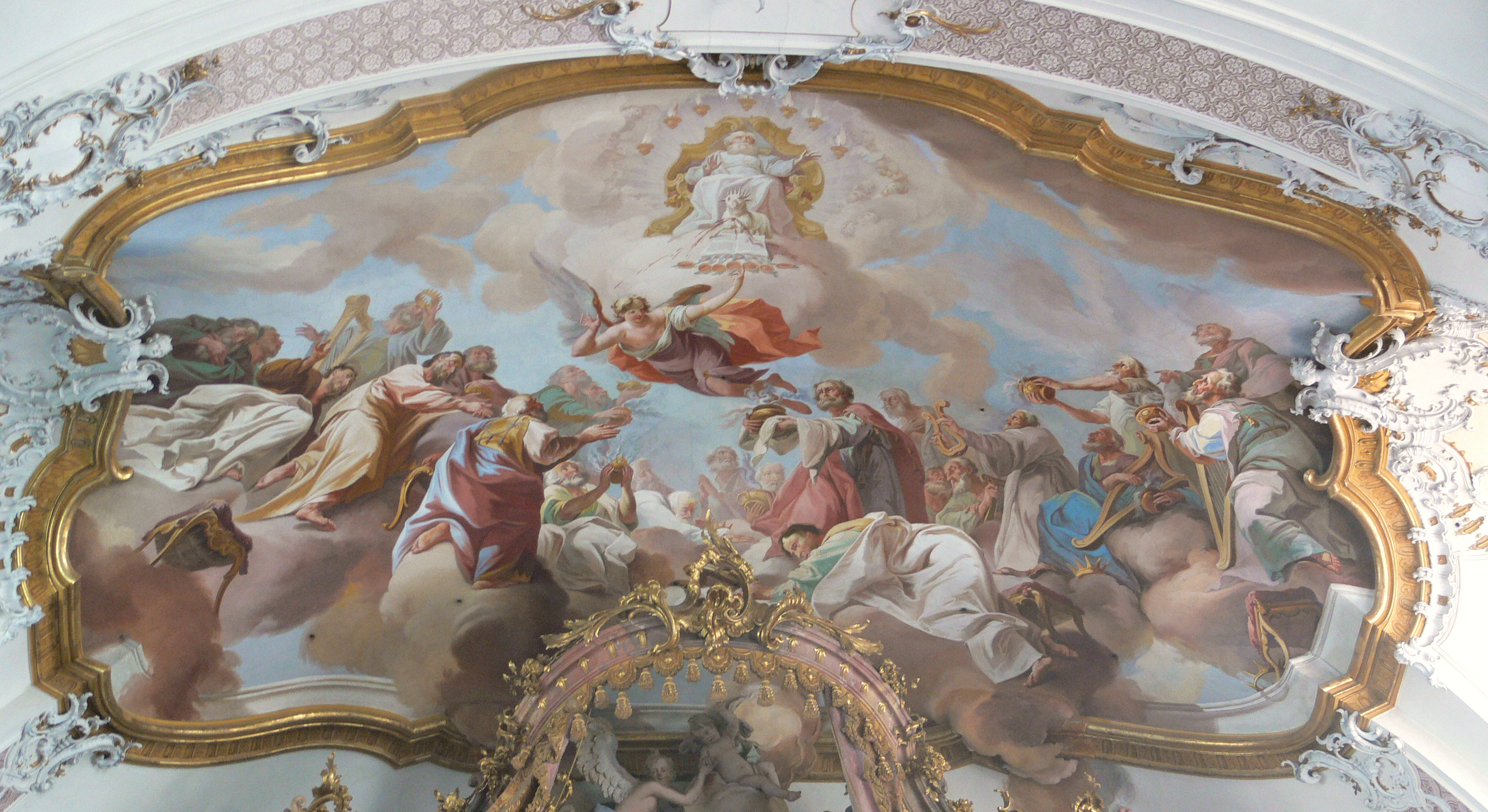 Ottobeuren, Basilika St. Alexander und Theodor: Hochaltarfresko "Apokalyptisches Lamm" von Johann Jakob Zeiller, 1756 (F 4) (Die sieben Siegel werden vor den 24 Ältesten vom Buch des unschuldig geschlachteten Lamms entfernt.)